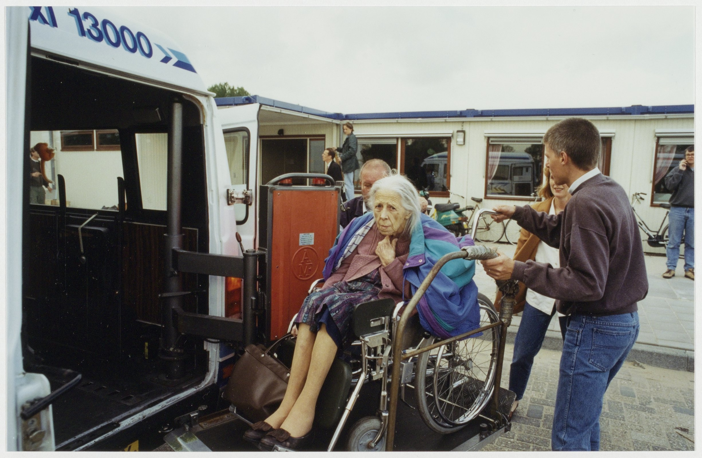 CollectieCollectie Fotoburo de BoerInventarisnummerNL-HlmNHA_54036186NL-HlmNHA_1478_41263kBeschrijvingBewoners van verpleeghuis Zuiderhout worden overgebracht naar de Boerhaavekliniek vanwege een verbouwing. Op de foto Charlotte martinot, voormalig sopraan bij de Nederlandse Opera.FotonummerNL-HlmNHA_1478_4756DocumenttypeHistorieprenten, tekeningen en foto'sVervaardigerHouts, Nils van (UP de Boer) Soort vervaardigerFotograaf AnnotatiesHD 100595LandNederland ProvincieNoord-Holland GemeenteHaarlem PlaatsHaarlem StraatBoerhaavelaan, Louis Pasteurstraat Begindatum10-05-1995Einddatum10-05-1995TechniekFoto Trefwoordengezondheidszorg, verkeer en vervoer